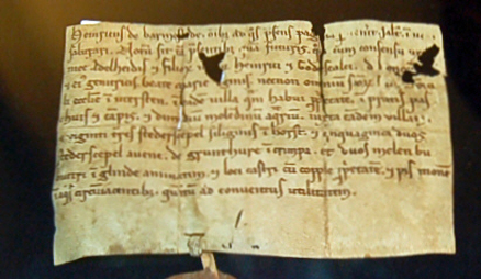 Schenkungurkunde des Ritters Heinrich II von Barmstede zur Gründung des Klosters Uetersen aus dem Jahre 1234, lateinisch abgefasst (Erste Urkunde der Stadt Uetersen). In dieser Urkunde wird auch die Gemeinde Horst und die Stadt Krempe erstmalig erwähnt. Fotografiert im Museum Langes Tannen in Uetersen.